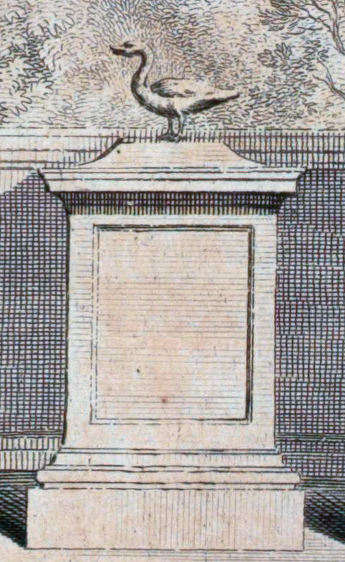 Gravure